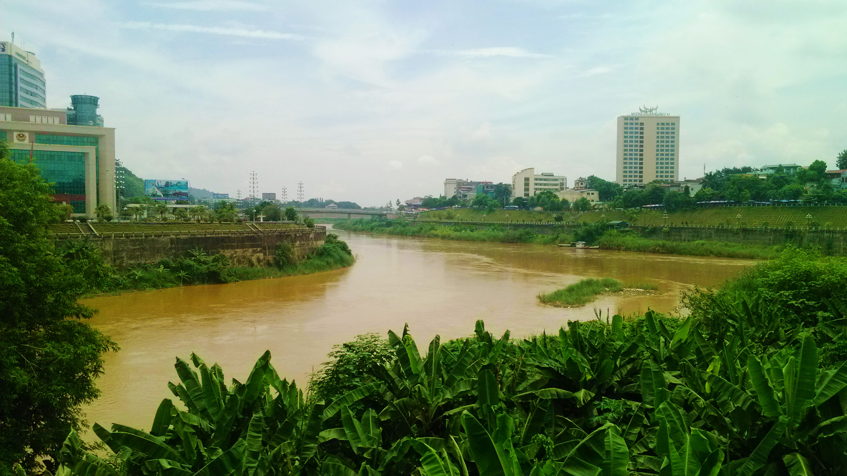 南溪河与红河（元江）交汇处。